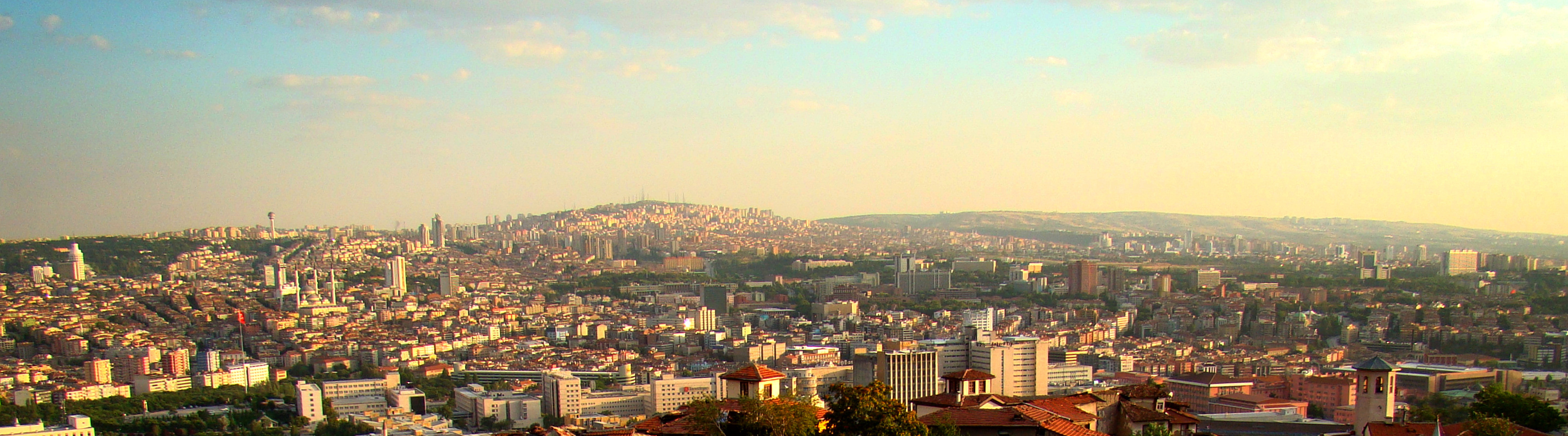 Ankara Kalesi'nden Ankara'nın şehir merkezinin panoramik manzarası. Kalenin hemen altında Altındağ belediyesinin Samanpazarı semti, fotoğrafın ortasında Refik Saydam Hıfzıssıhha Merkezi, Hacettepe Hastanesi, İbn-i Sina Hastanesi ve solda Kocatepe Cami görülmektedir.